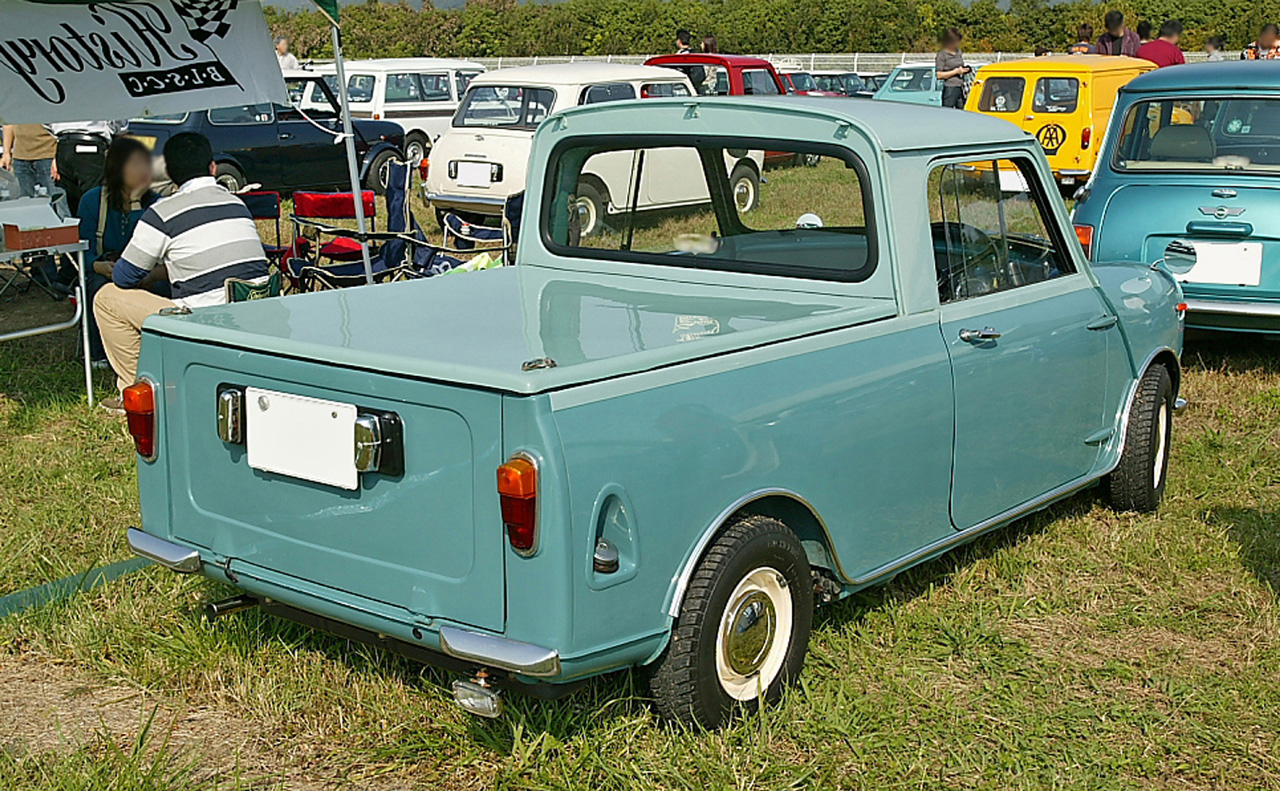 Mini Pickup